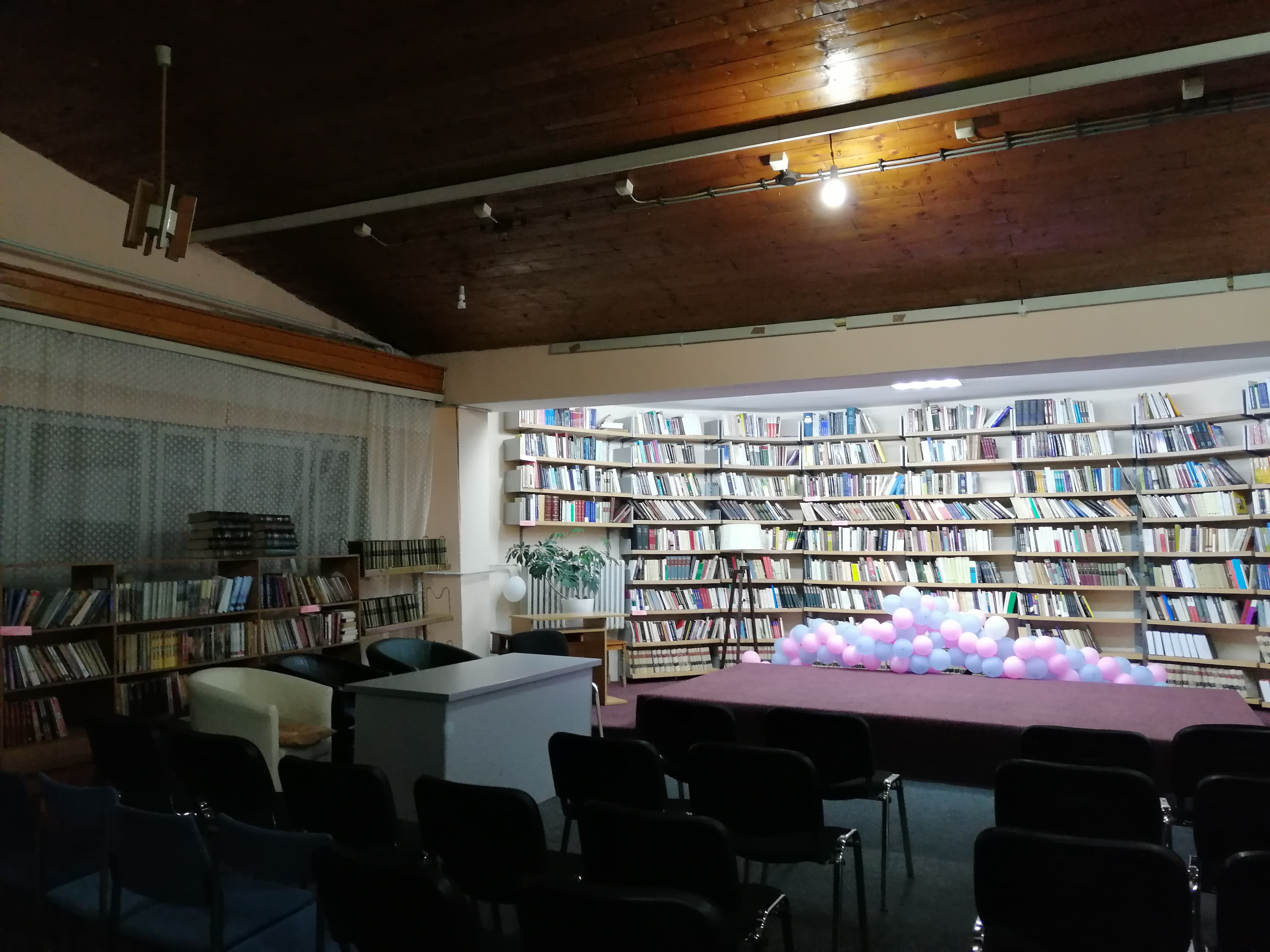 Narodna biblioteka Pirot, odraslo odeljenje